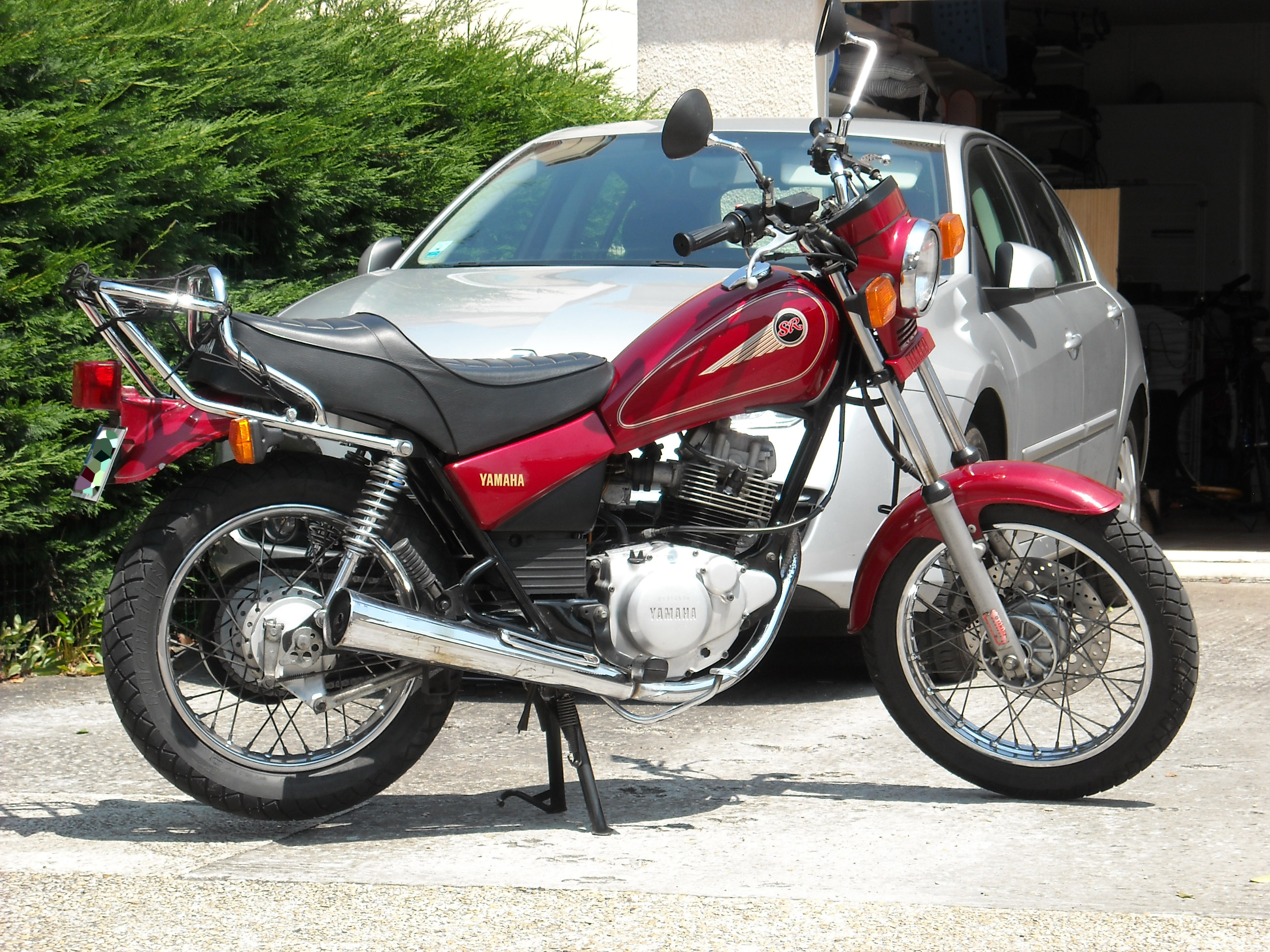 modèle SR 125 année 1998, porte-paquet optionnel Renntec.